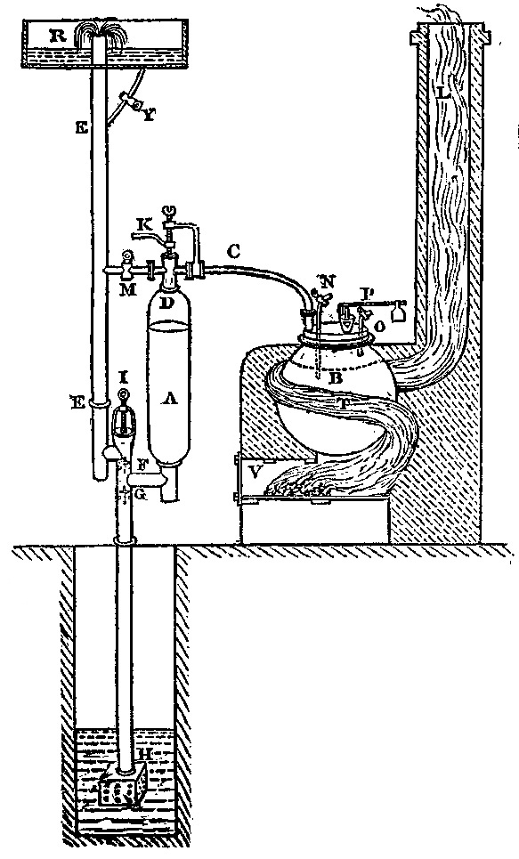 J. T. Desaguliers により改良されたセイヴァリ機関